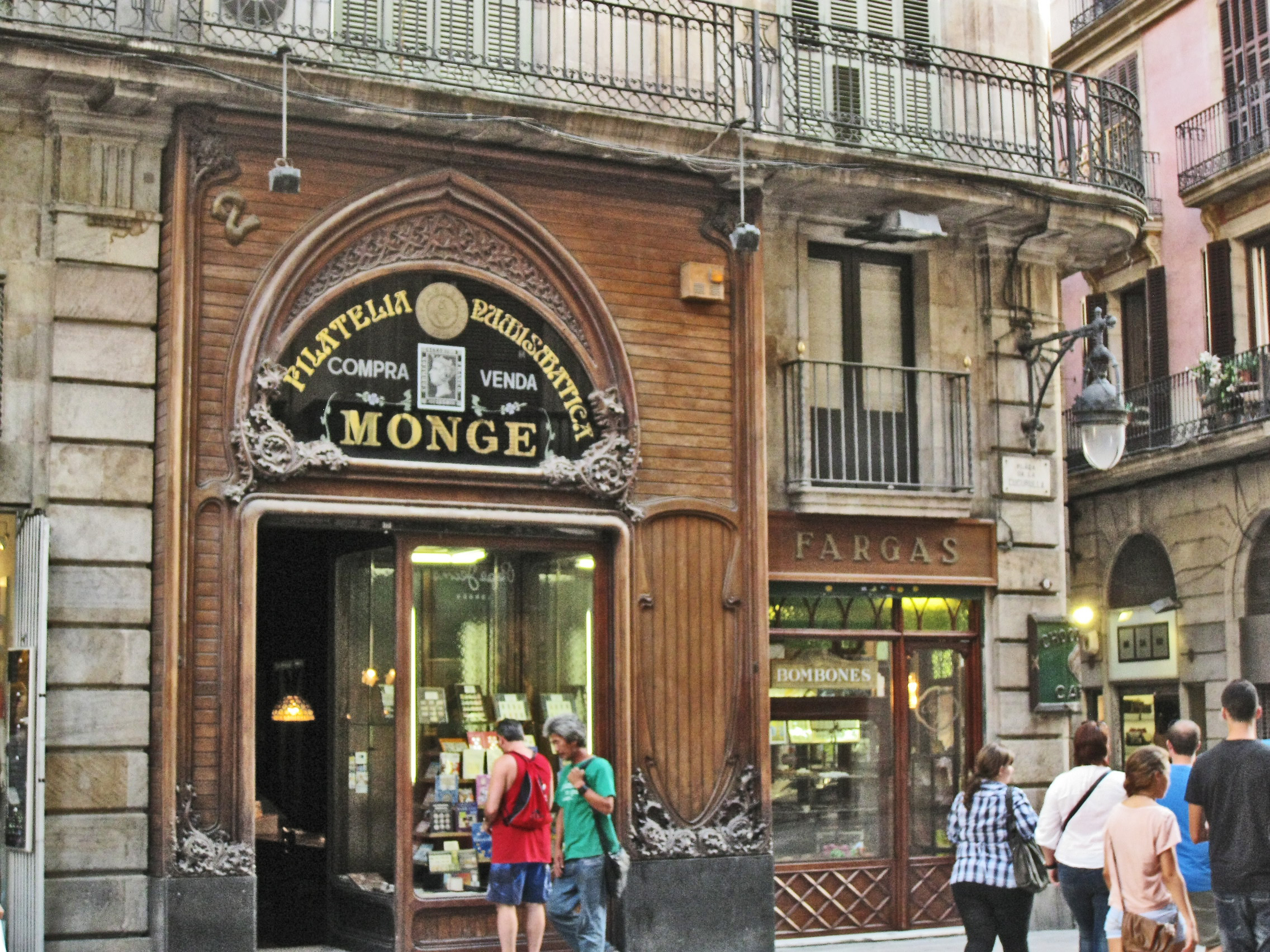 Palau Castell de Ponç, del segle XIX, al carrer Boters, a la cantonada amb el carrer del Pi. Inclou als baixos la filatèlia Monge (modernista, de vers el 1910) i la pastisseria Fargas (del segle XIX).